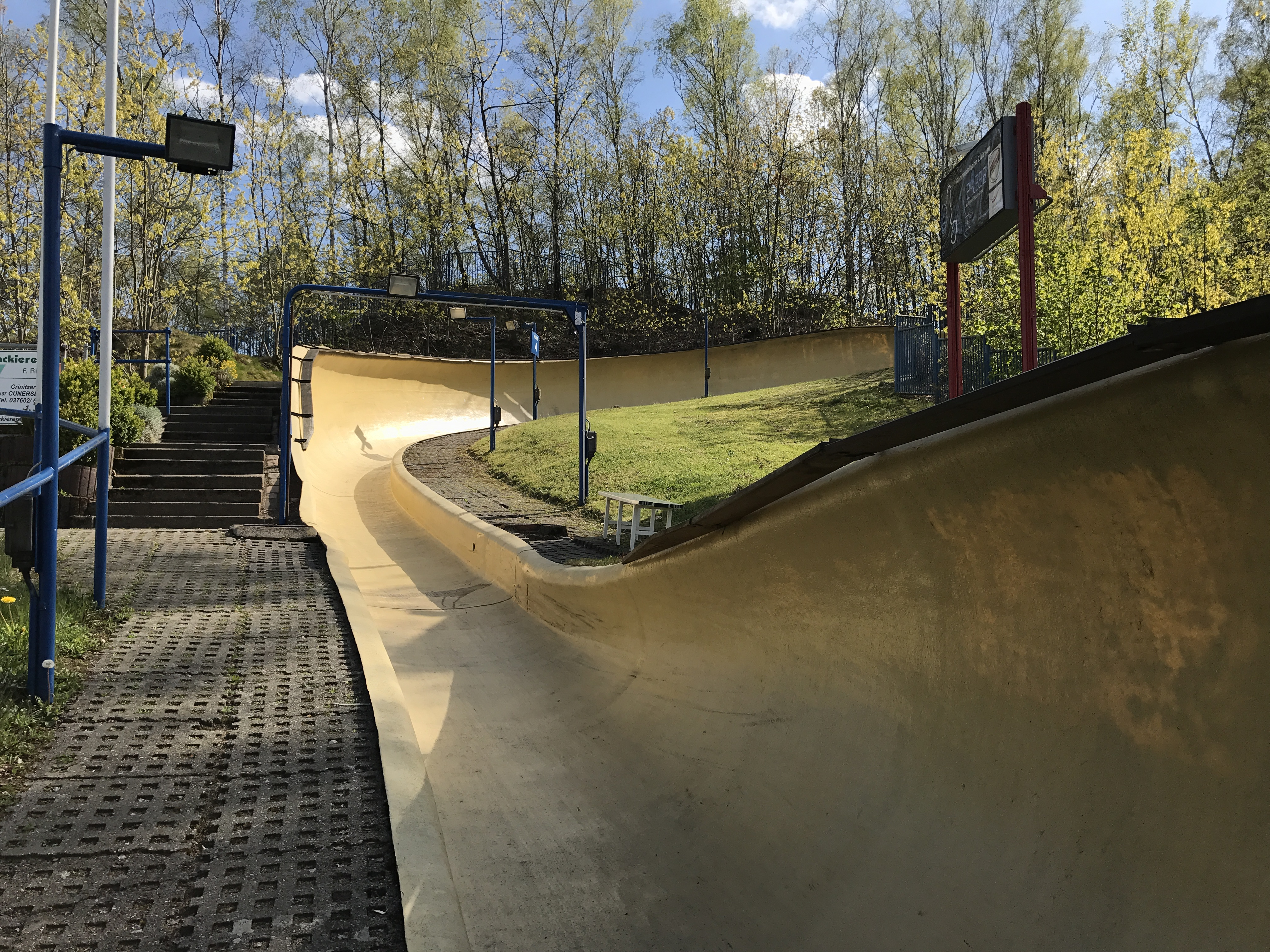 Das Bild zeigt die Kurve 4 aus Richtung der Kurve 5